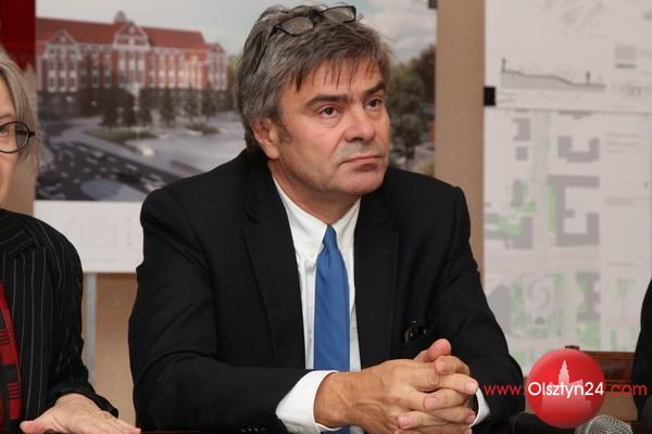 Włodzimierz Mucha - polski architekt, współzałożyciel pracowni Bulanda i Mucha Architekci. Olsztyn, 2013